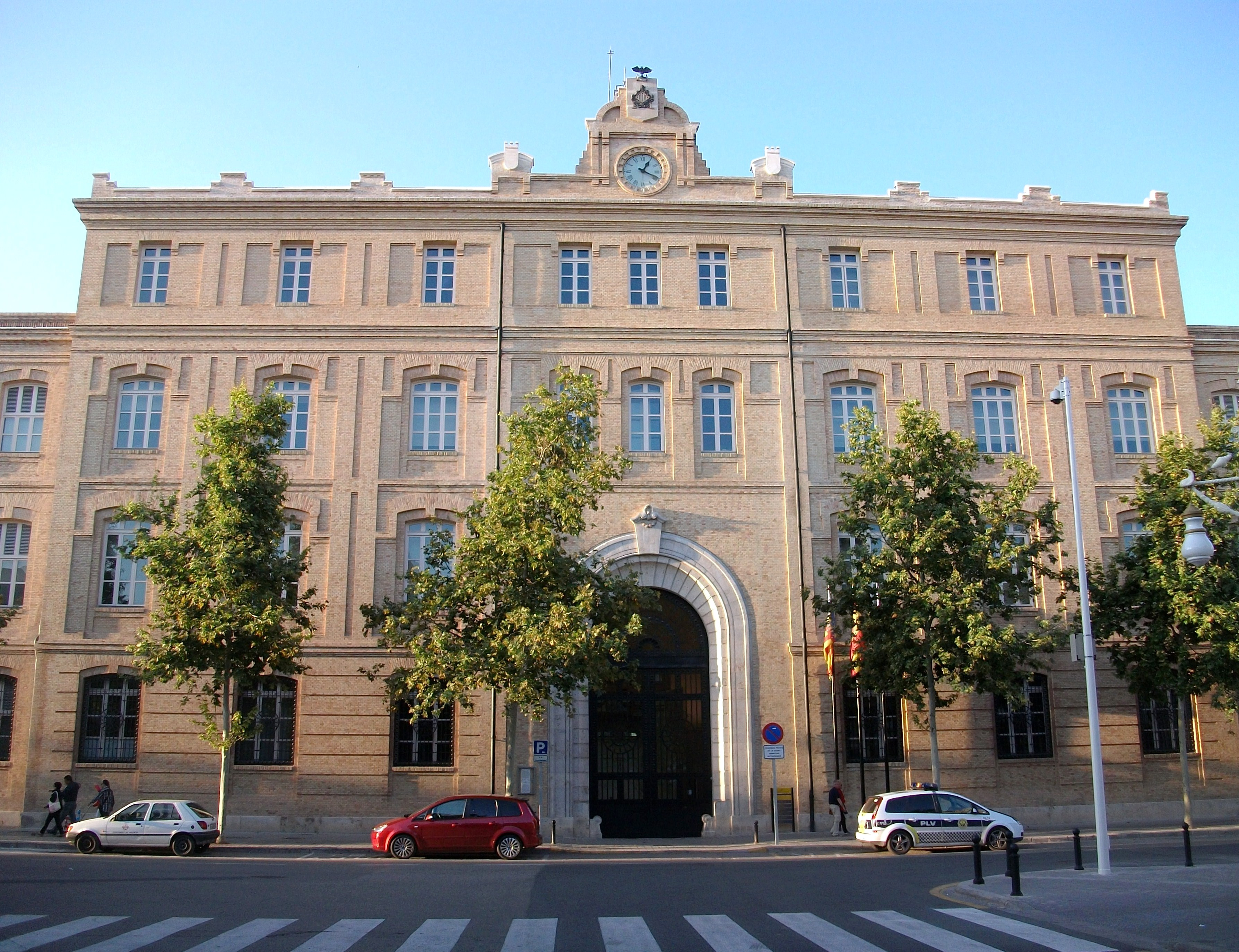 Tabacalera de València, construïda a principis del segle XX i actualment ocupada per oficines de l'Ajuntament.